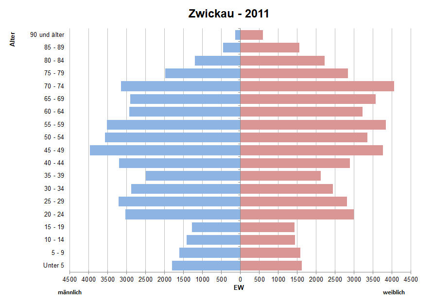 Bevölkerungspyramide der Stadt Zwickau nach Zensus 2011.